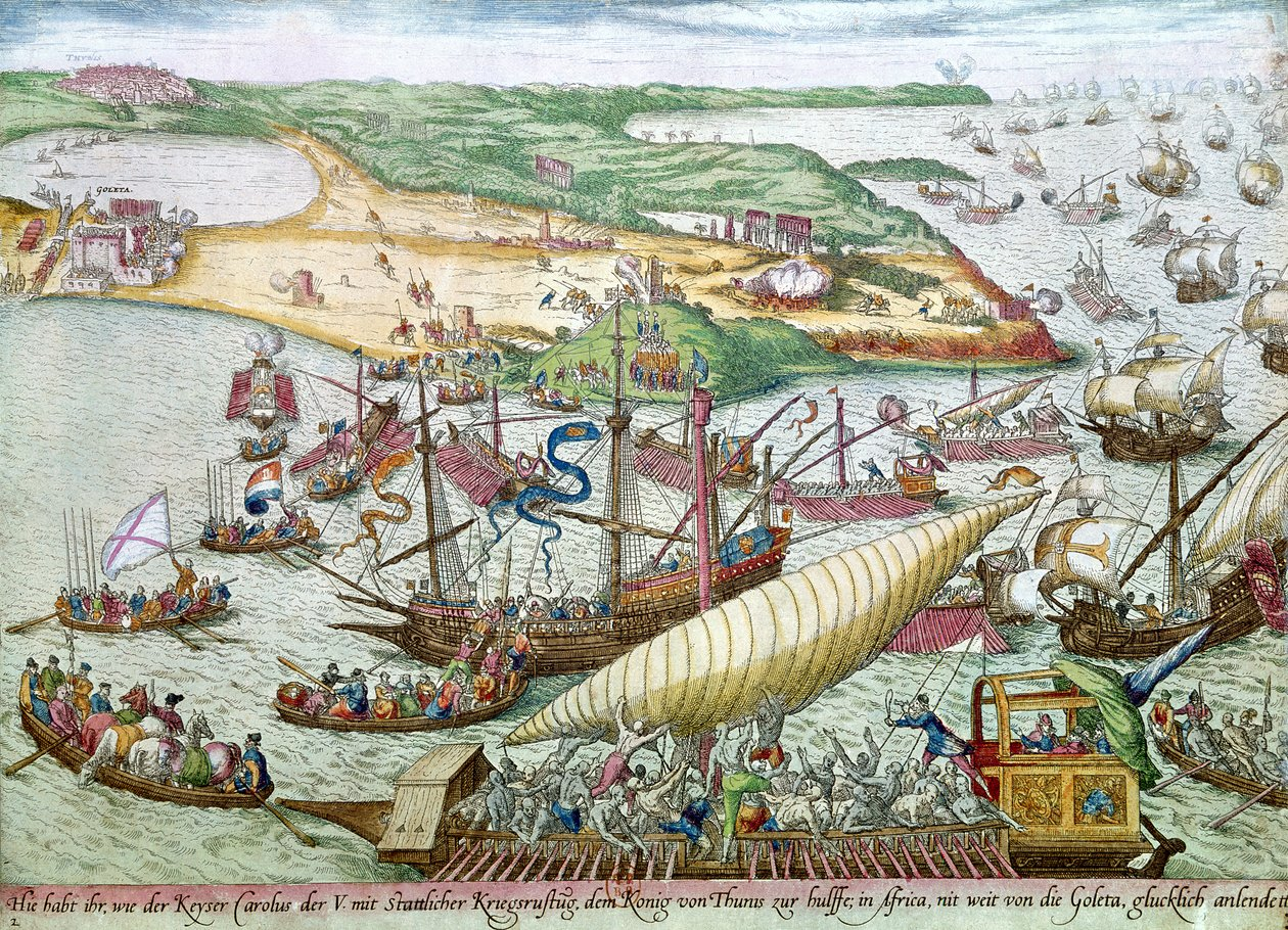 Expédition de Charles Quint à Tunis en 1535.